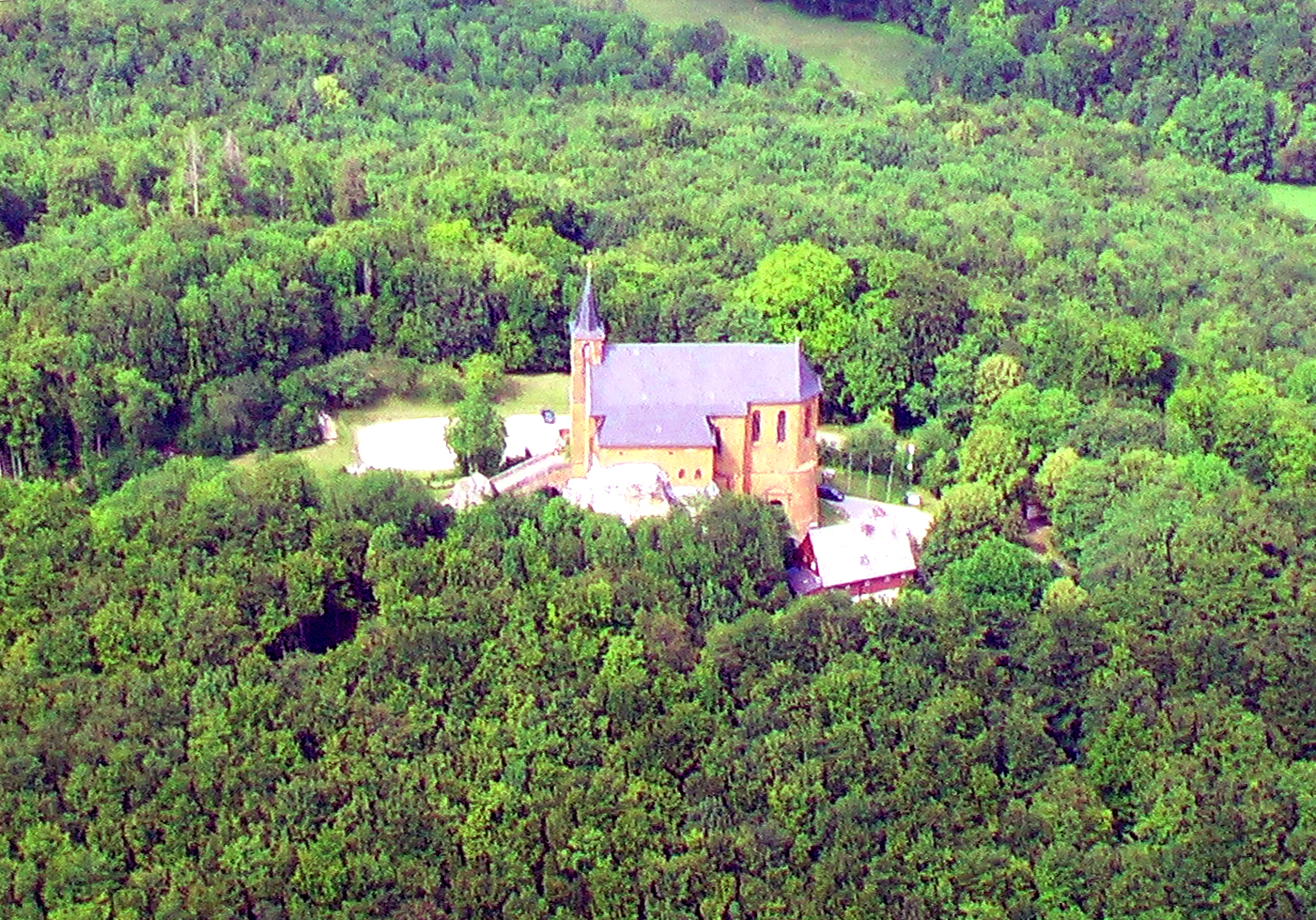 Gügel